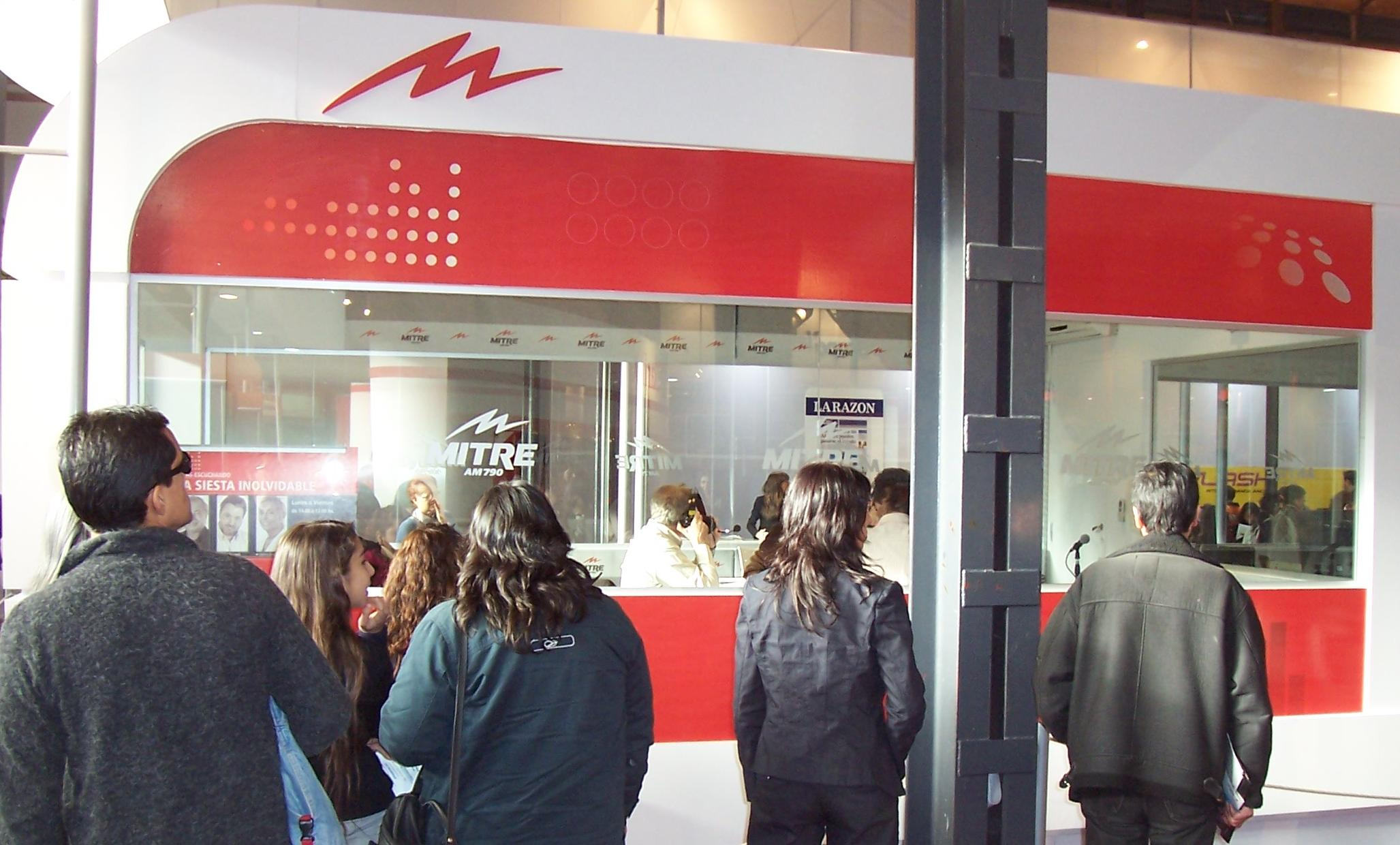 Estudio de LR6 Radio Mitre en la 33° Feria Internacional del Libro en la ciudad de Buenos Aires (Argentina).